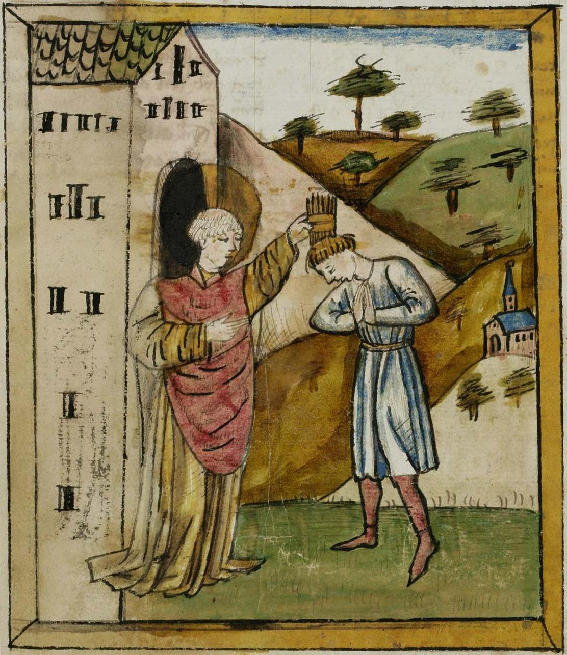 Heilung eines Kranken mit der Kammreliquie Wiboradas - Illustration aus Deutsche Heiligenleben, Codex 602 der Stiftsbibliothek St. Gallen, S. 359